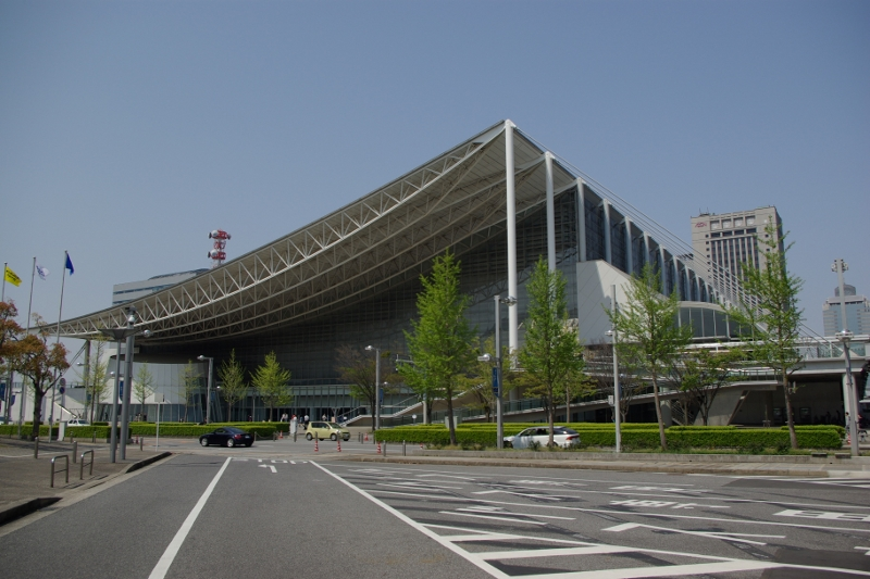 国際展示場9～11ホール（幕張メッセ）